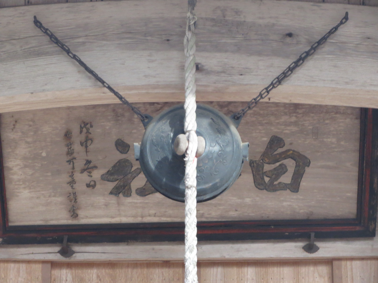 北上市黒岩にある白山神社銅鰐口 Canon IXY 3